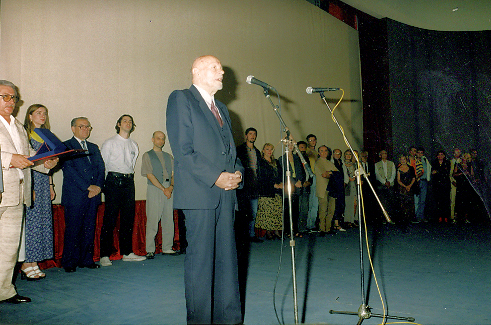 Mića Tomić prima nagradu "Pavle Vujisić" na Filmskim susretima u Nišu 1997. godine